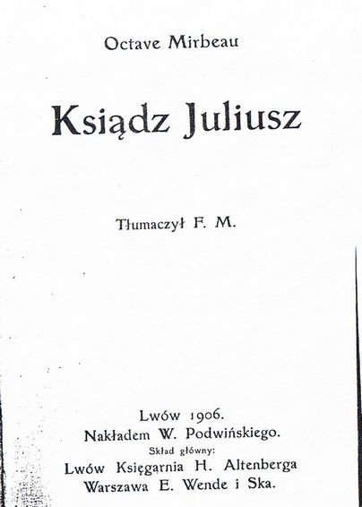 Couverture de la traduction polonaise de L'Abbé Jules, d'Octave Mirbeau (1848-1917).